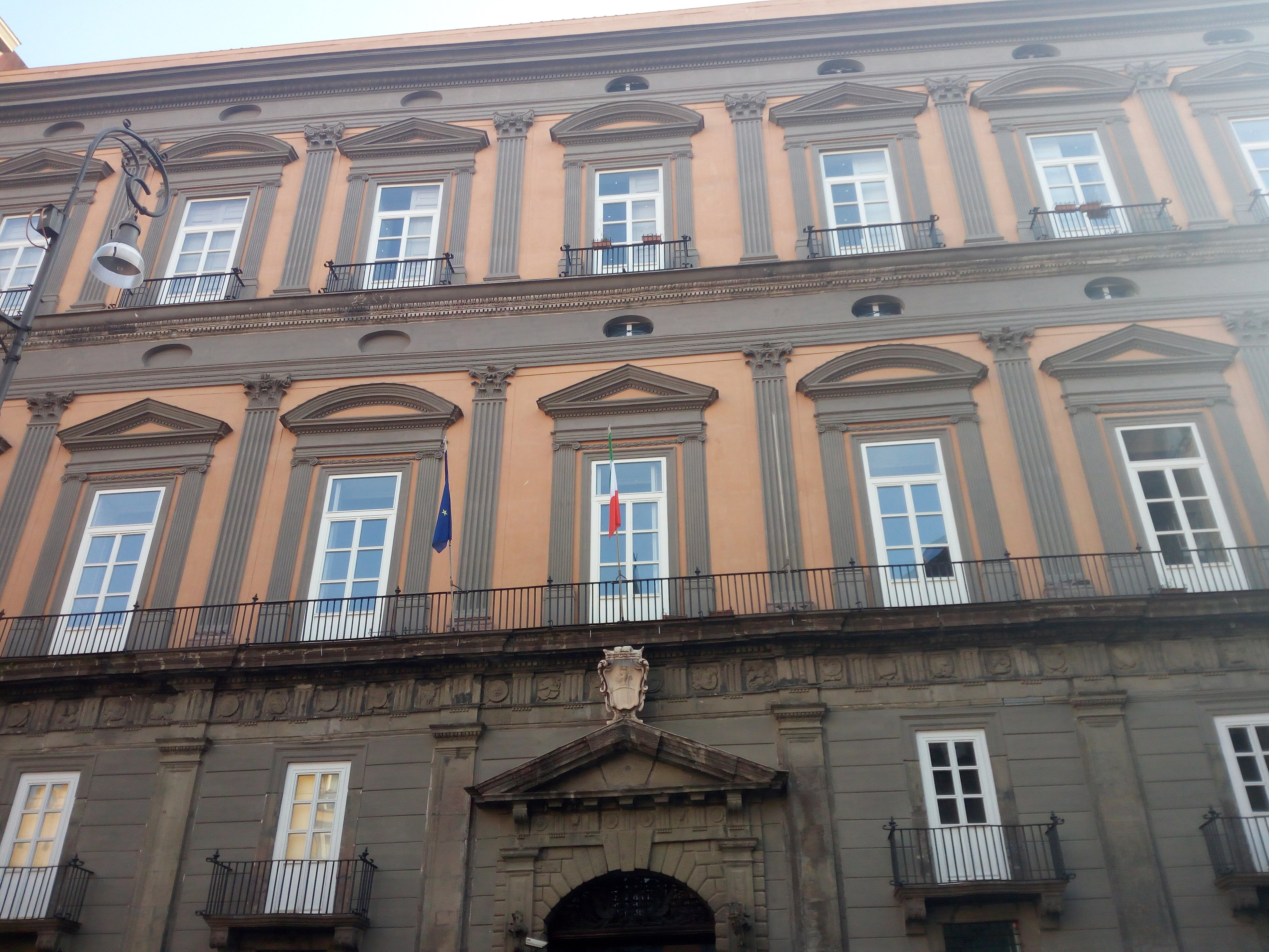 Palazzo Corigliano, marzo 2018